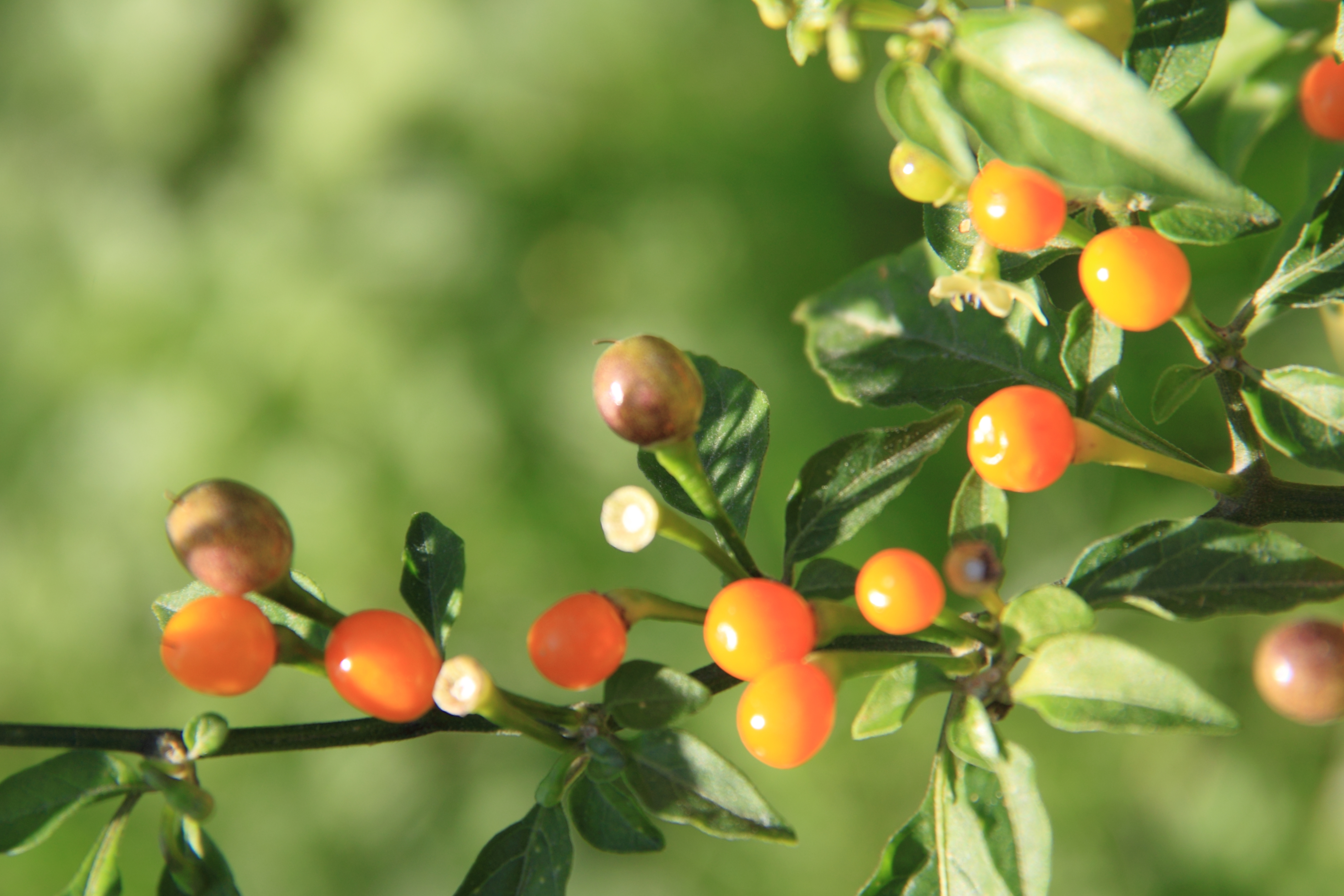 Muséum de Toulouse Native nameMuséum de ToulouseLocationToulouse, FranceCoordinates43° 35′ 37.89″ N, 1° 26′ 57.42″ E Established1796: established ; 1865: opened to publicWeb page control : Q422 VIAF: 130895847 ISNI: 0000 0001 2158 3469 SUDOC: 028667107 BNF: 120455376 Museofile: M7013 institution QS:P195,Q422